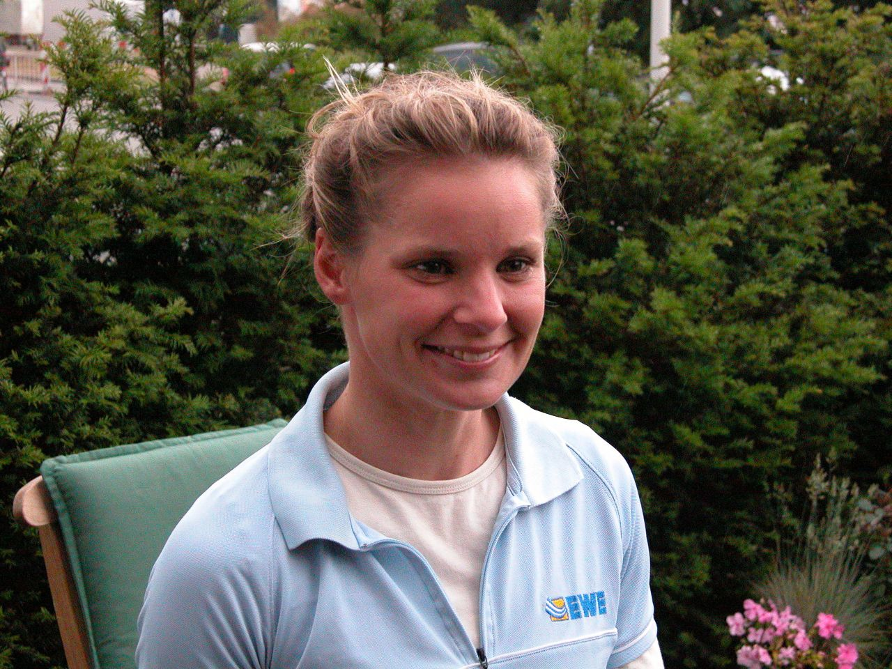 Amelie Lux